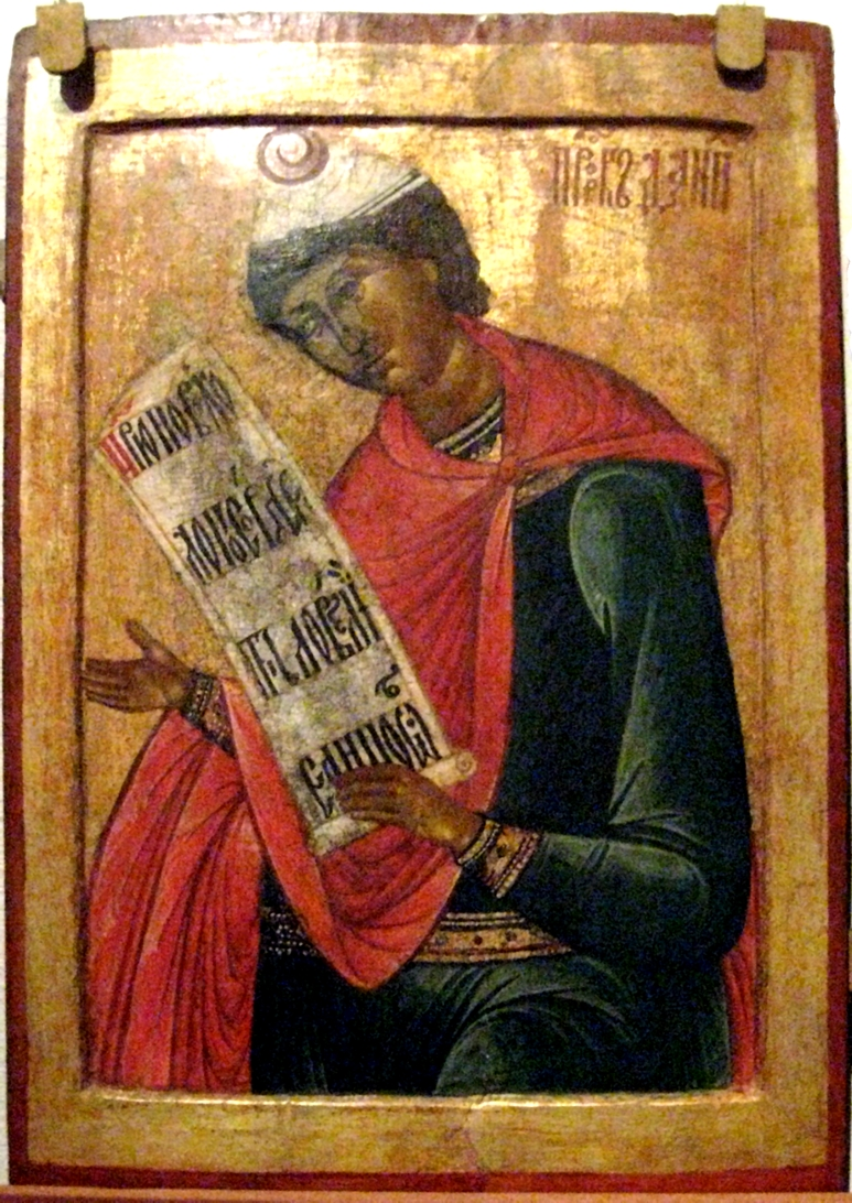 Пророк Даниил. Иконописец Терентий Фомин (?) Вологда (уп. 1646–1670). Церковь Епифания Кипрского Кирилло-Белозерского монастыря